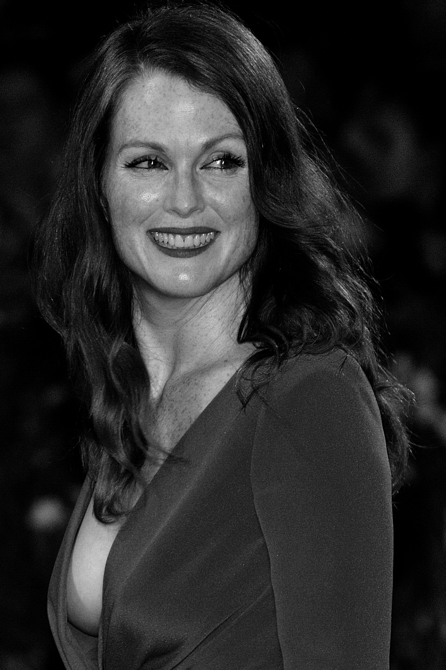 66ème Festival de Venise (Mostra) Julianne Moore